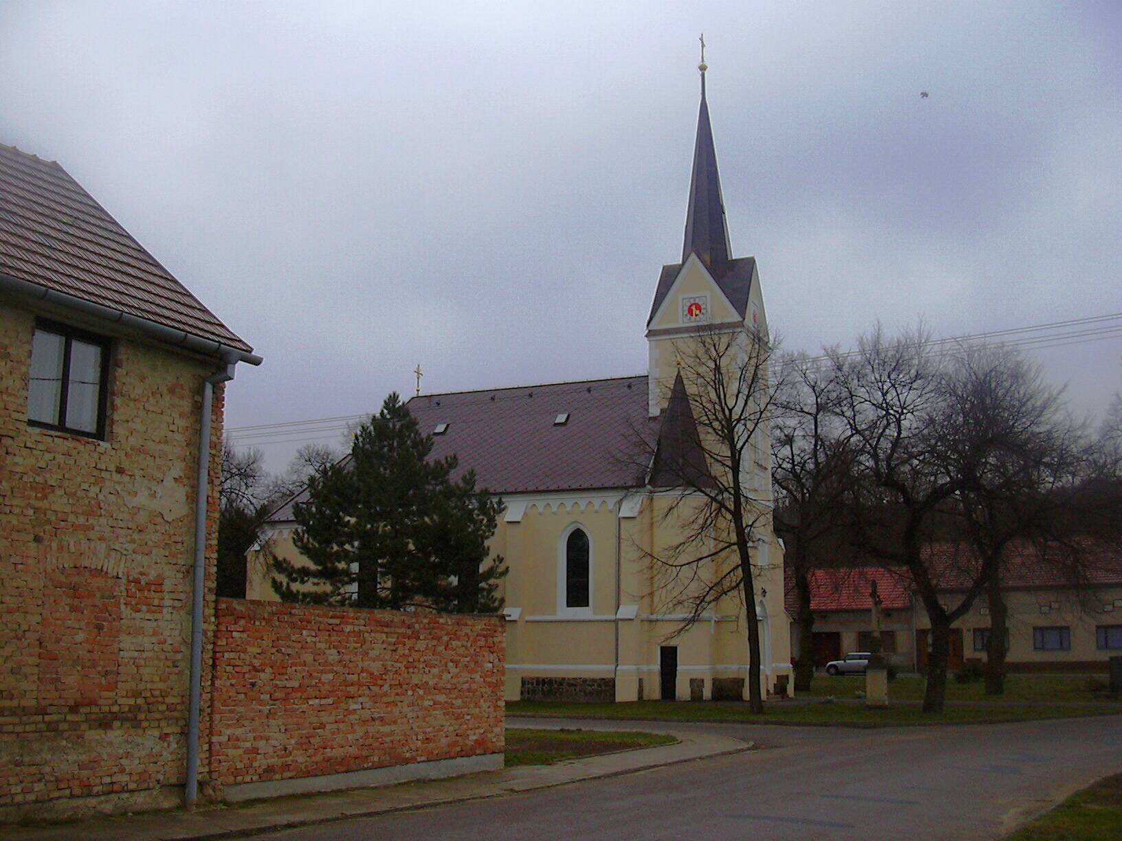 kostel Podbřežice (Vyškov- Czech republic)